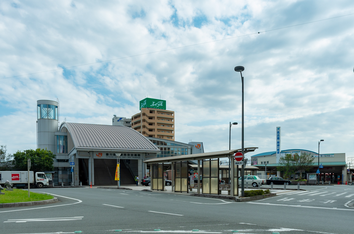 東海旅客鉄道株式会社飯田線豊川駅駅舎